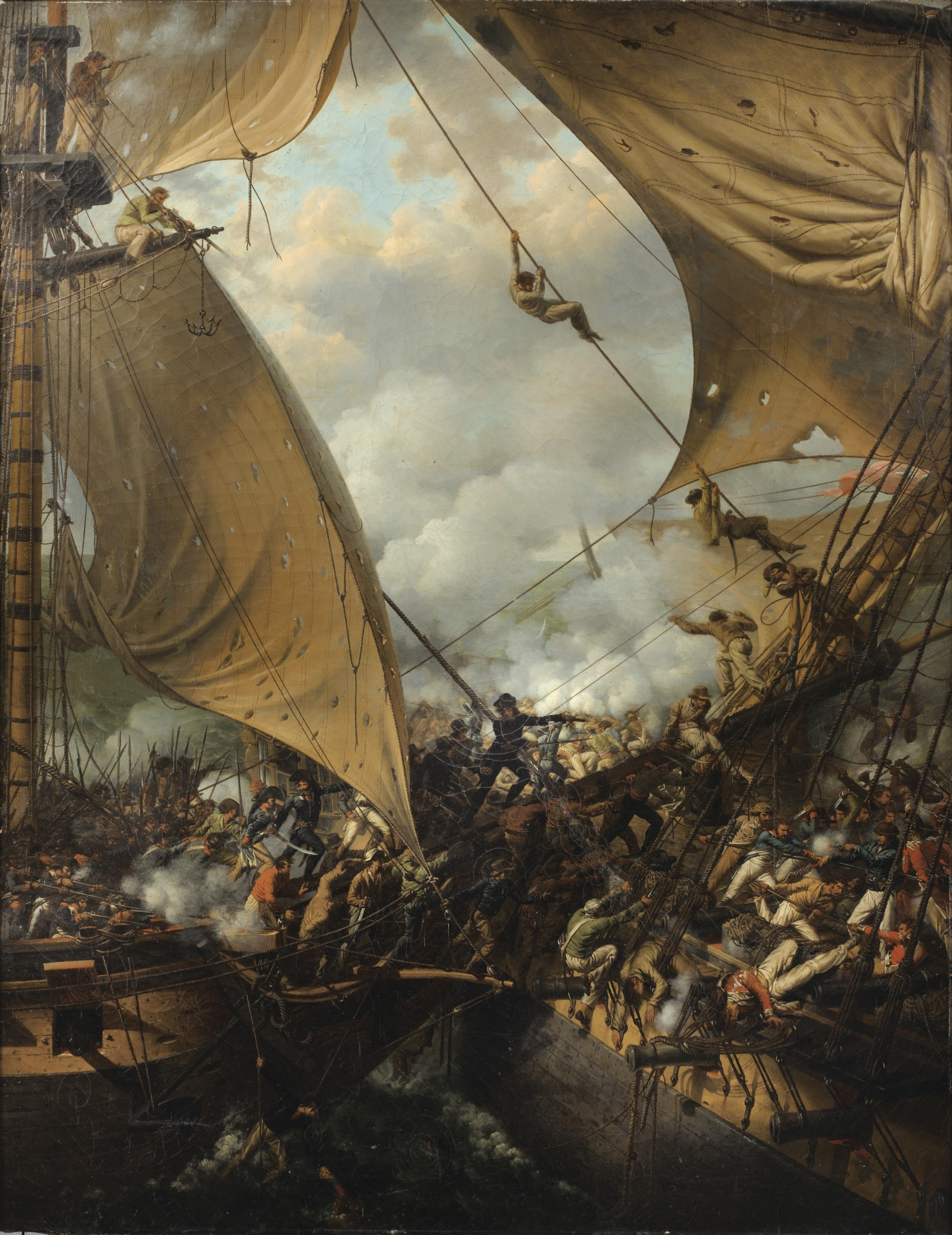 Représentation probable de l'abordage et de la prise par la corvette française La Bayonnaise de la frégate anglaise L'Embuscade en 1798. Guerre de la Révolution française. Huile sur toile 146,5 x 114 cm